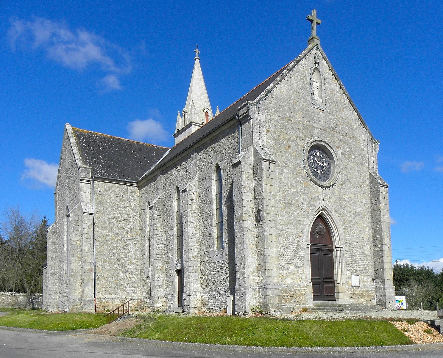 Église Notre-Dame-de-la-Tour en Languédias (22).